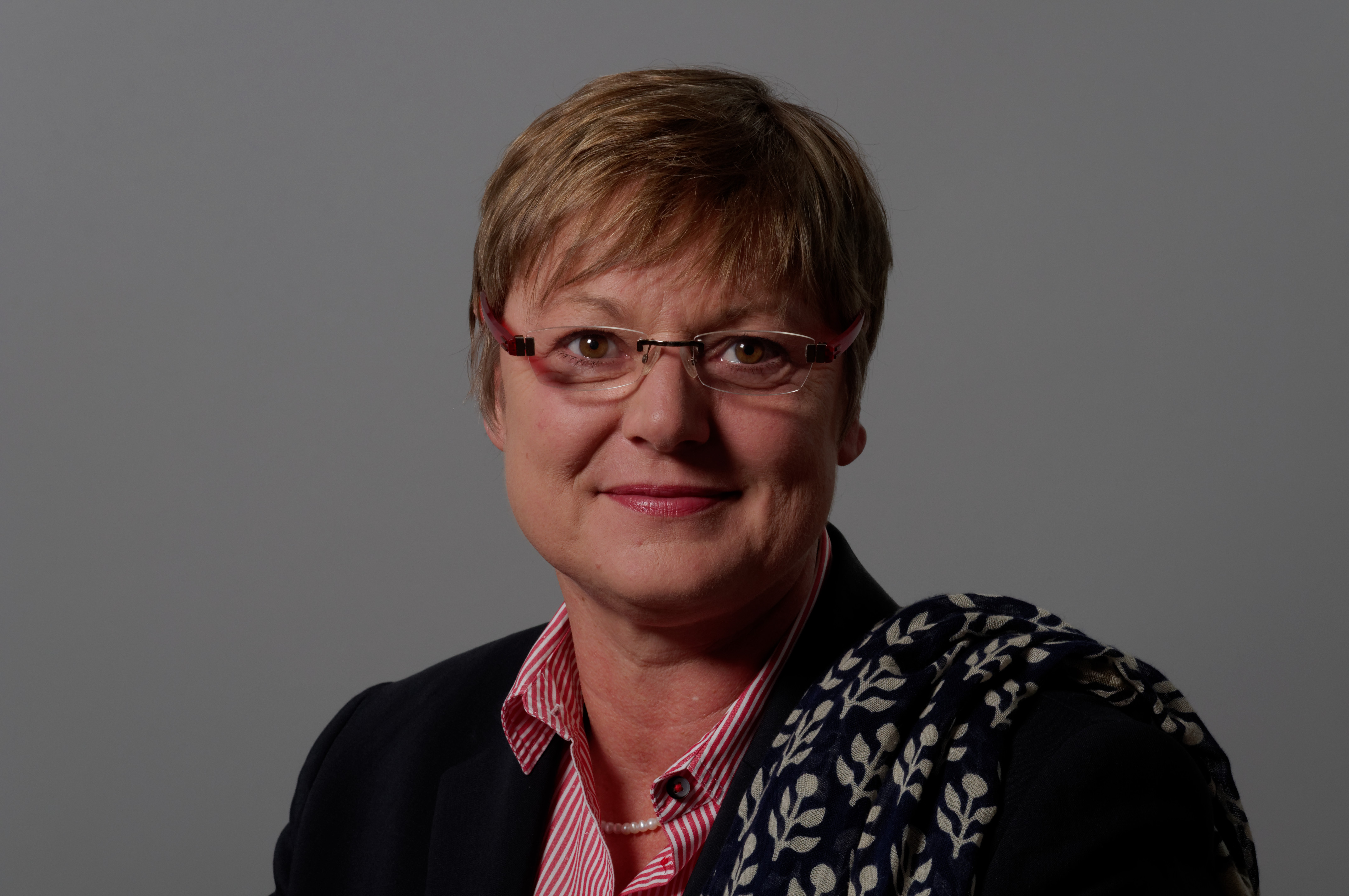 Kirsten Eickhoff-Weber, SPD